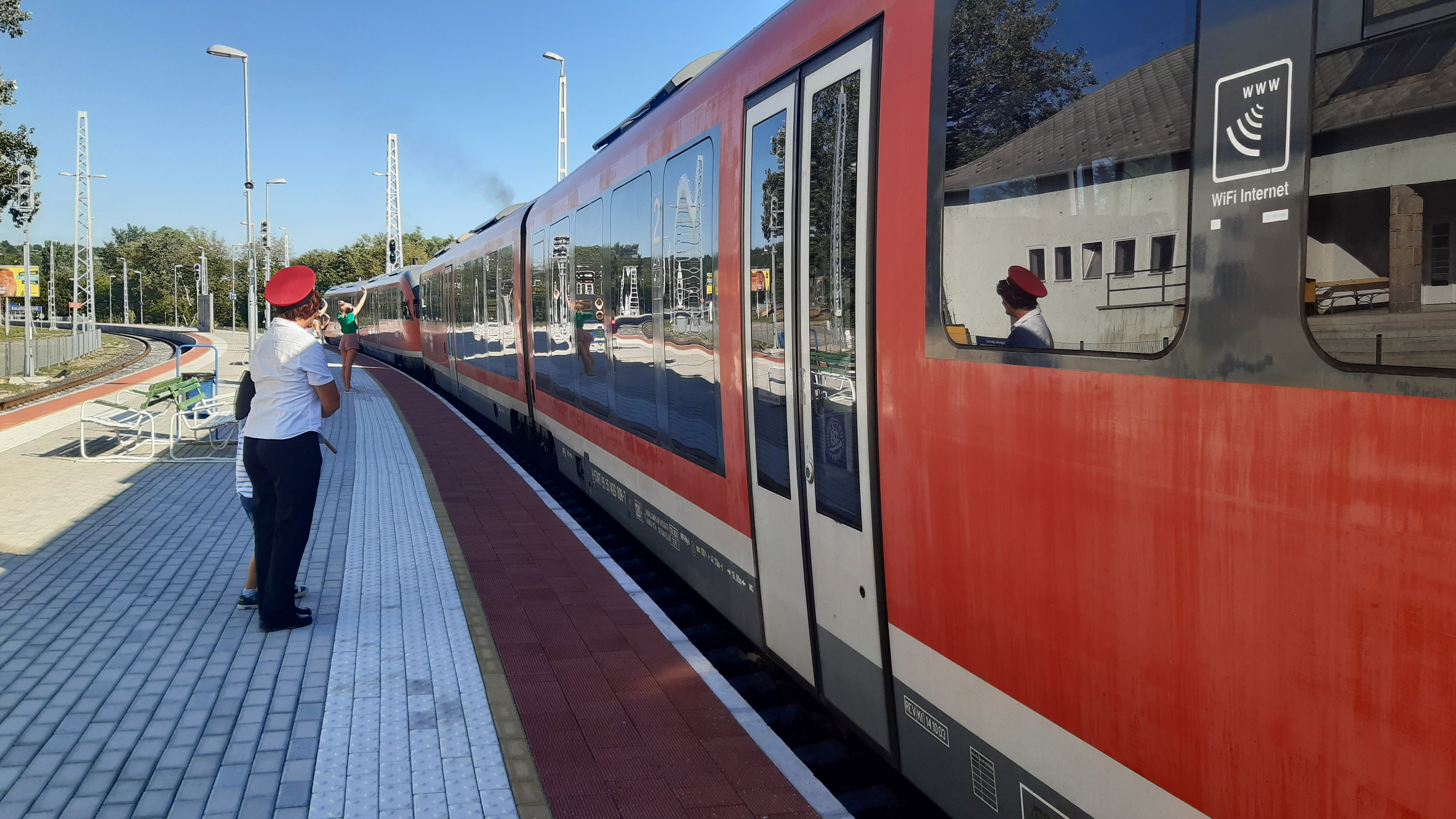 Balatonfűzfő vasútállomás, Katica sebesvonat indul